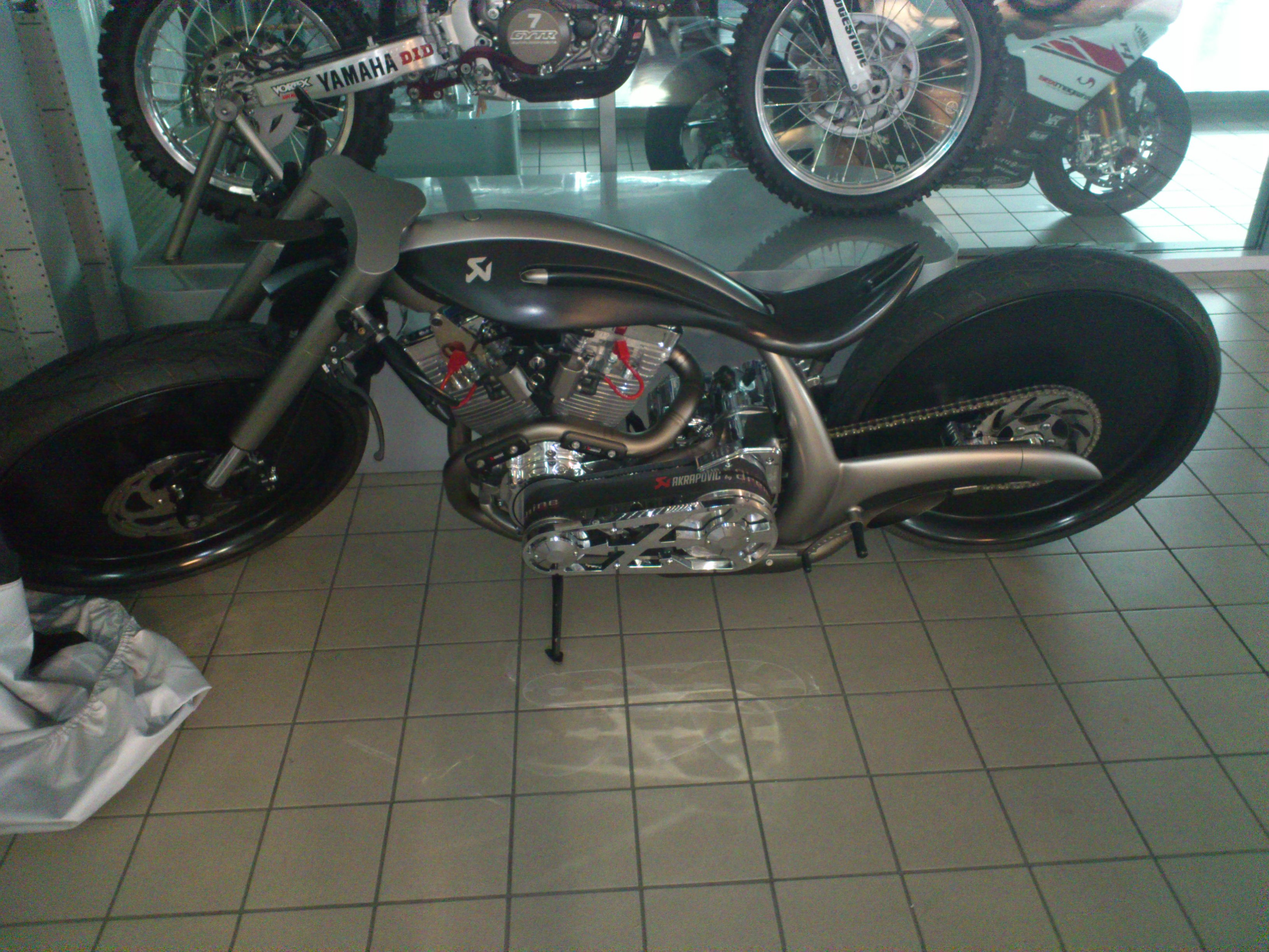 Motor lastne izdelave podjetja Akrapovič, 2010.